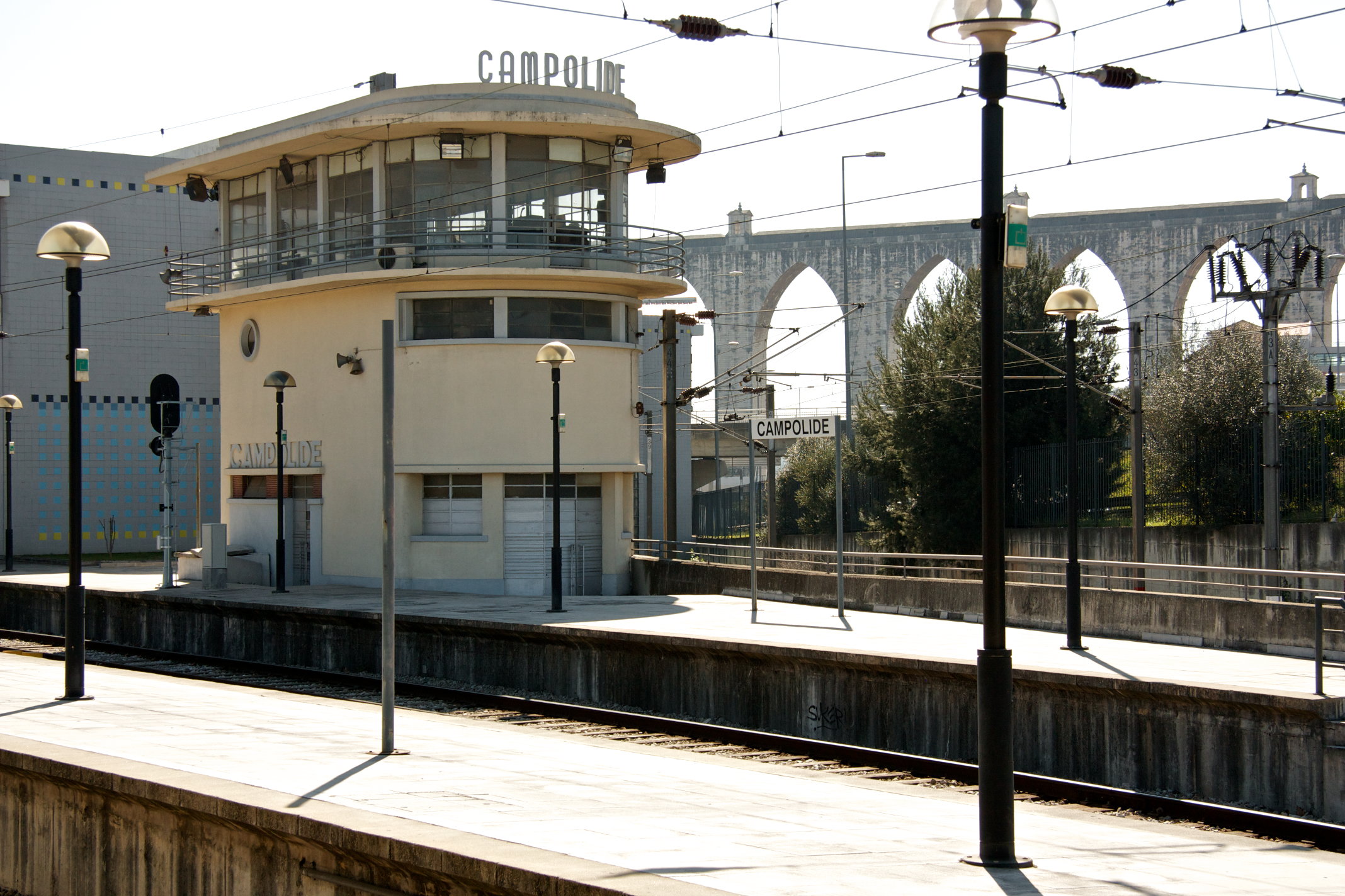 Tipo: EC Estação de Concentração Local: Lisboa [Linha de Sintra, PK 3] Data e hora: 24 de Fevereiro de 2012 [13h59]